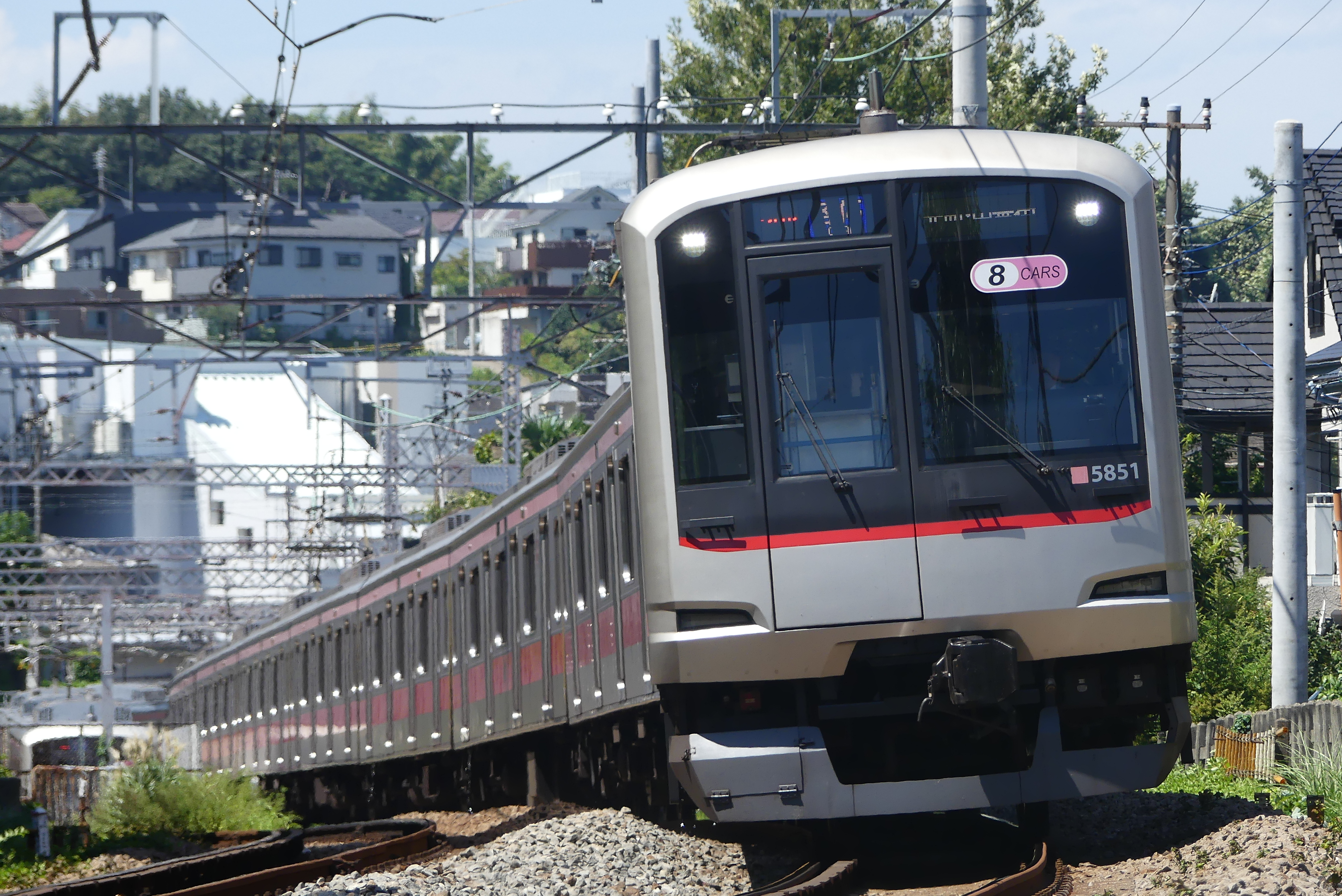 東急電鉄5050系電車